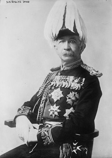 Evelyn Wood